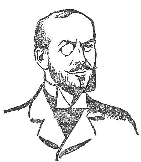 "Gabriel Syveton".